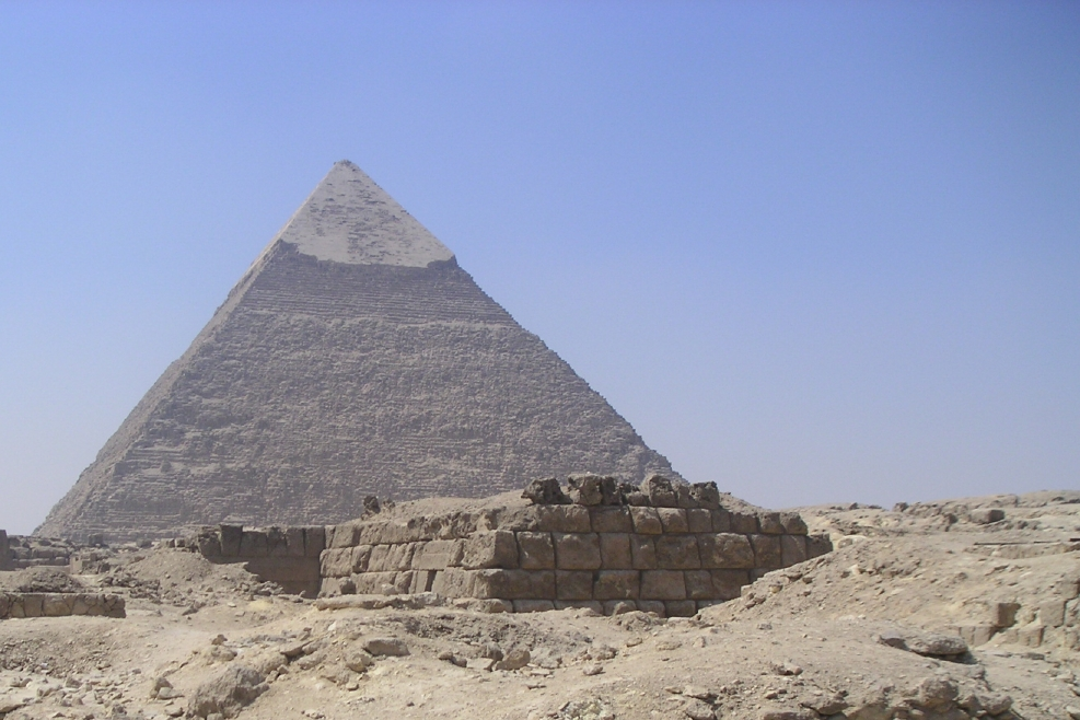 Vue sur le mastaba de Sechemnéfer III avec en arrière plan la pyramide de Khéphren - Gizeh - Ve dynastie égyptienne